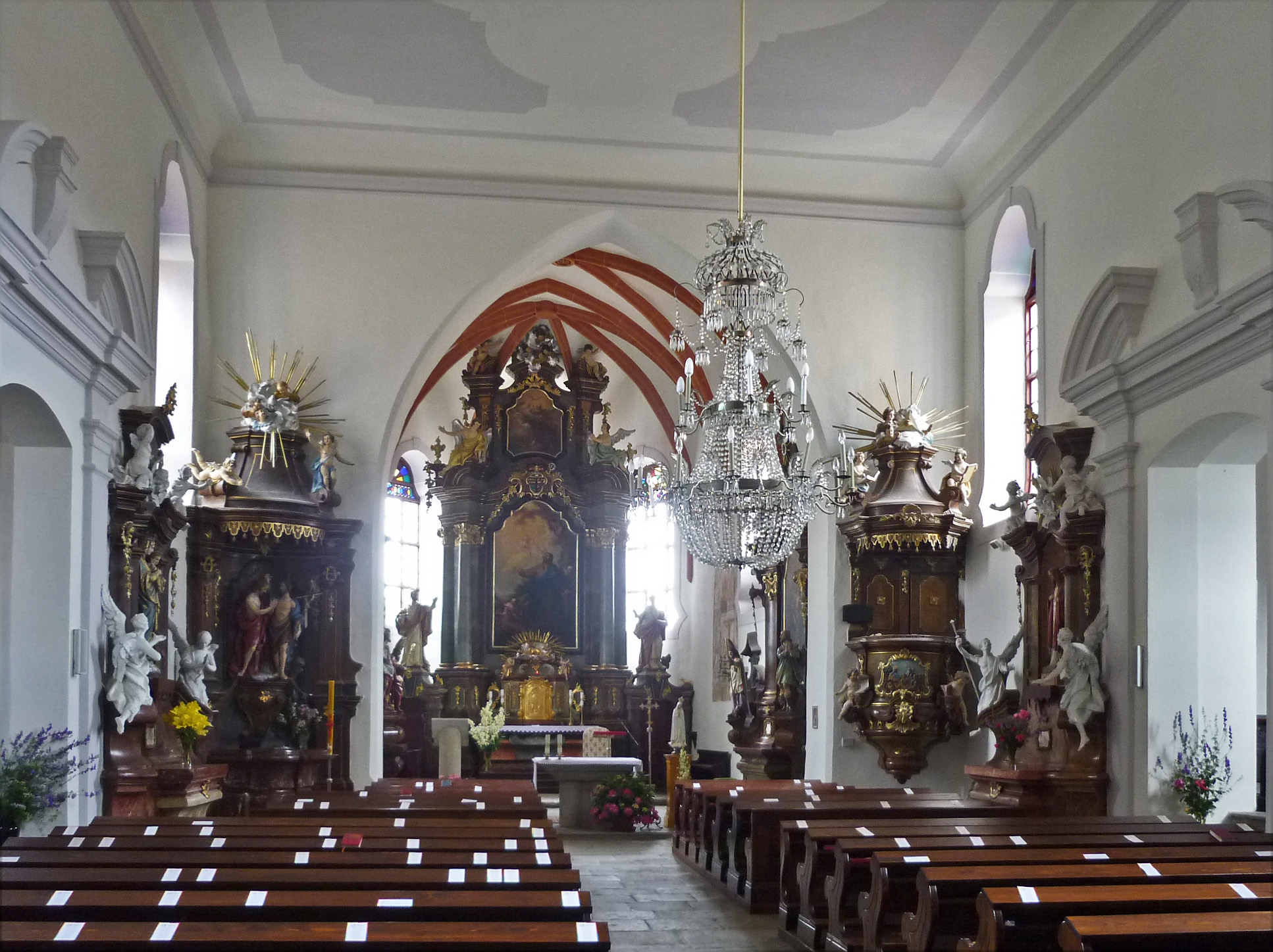 Innenraum der Jakobskirche in Moldauthein (Týn nad Vltavou ) in Südböhmen